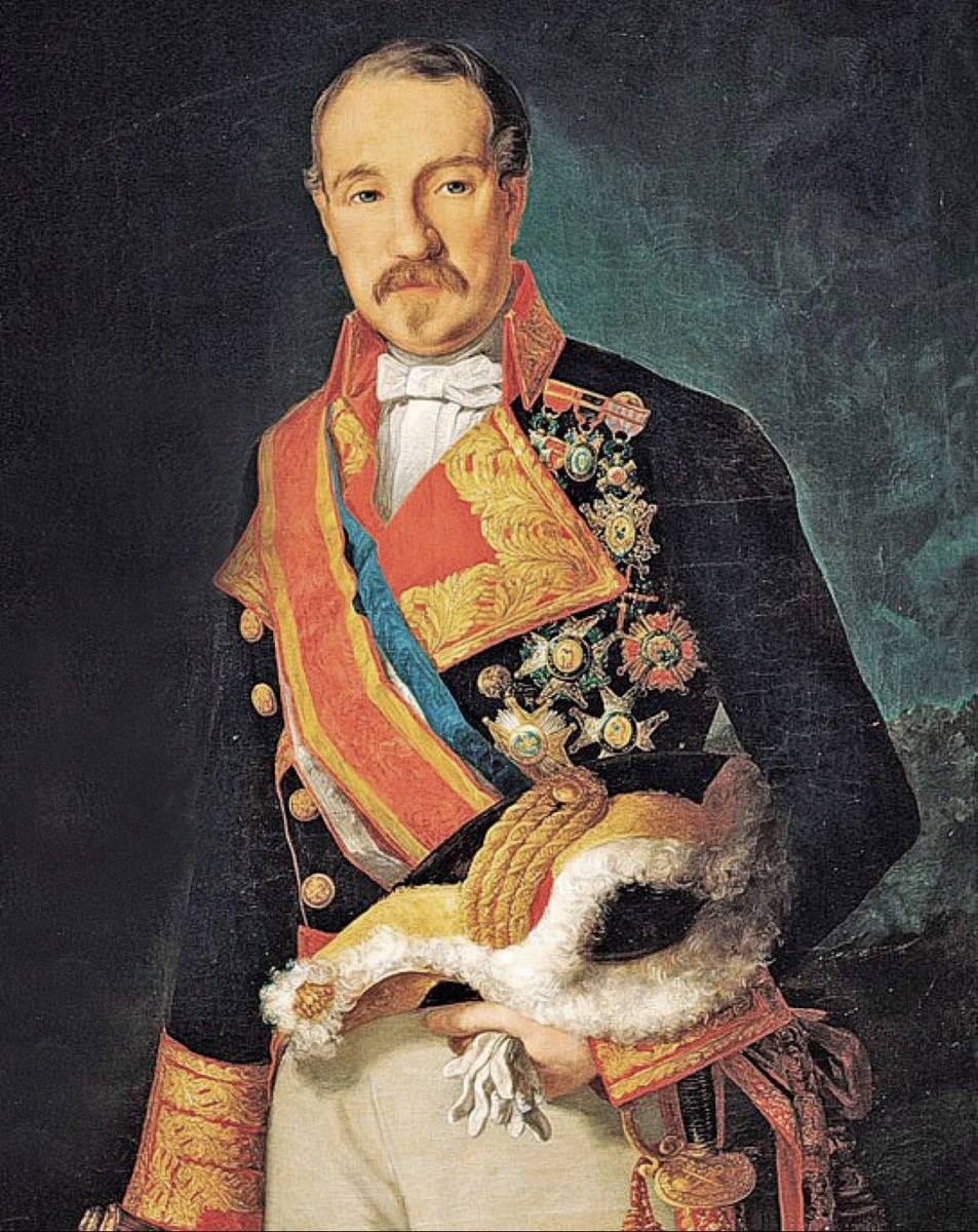 Retrato del general español, Leopoldo O'Donnell y Jorís (1809-1867)